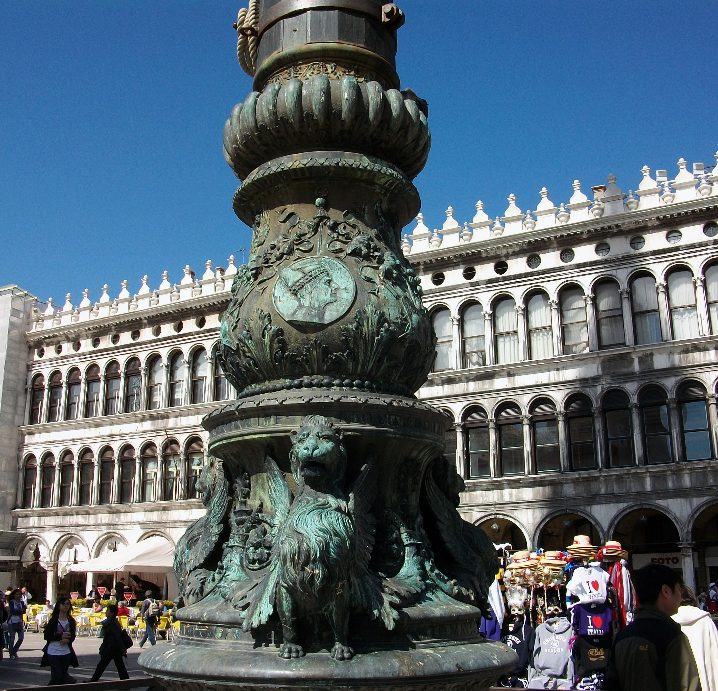 Base del piló per a bandera, plaça de sant Marc de Venècia.